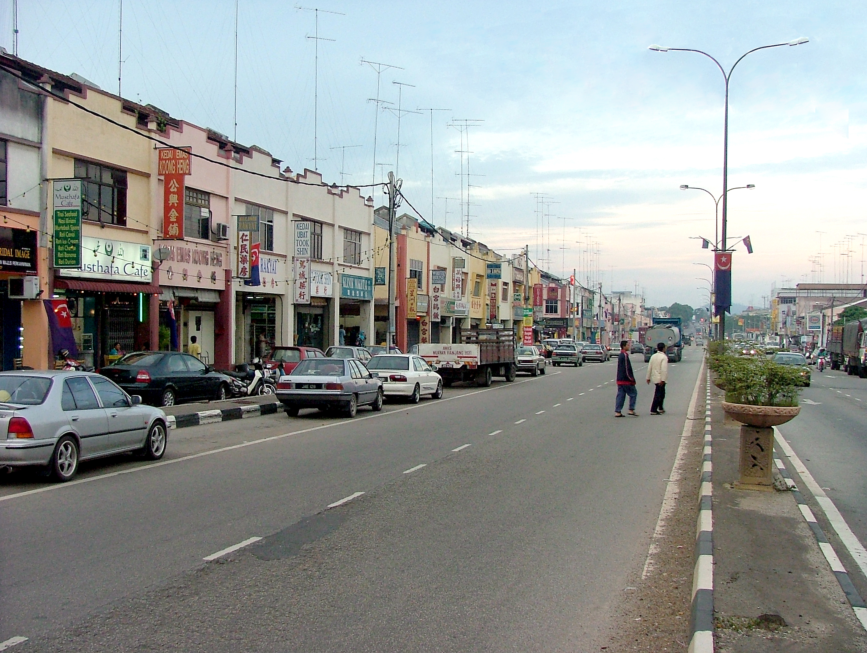 Jalan raya utama bandar Yong Peng. Perhatikan aerial televisyen yang melebihi 20 kaki yang merupakan ciri utama rumah-rumah di bandar ini.